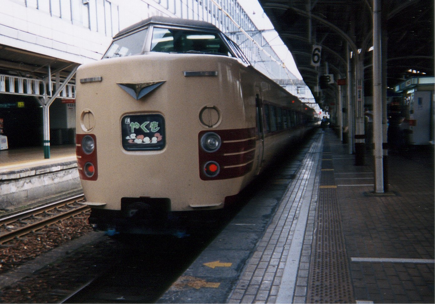 撮影日不明（おそらく1997年ごろ）。岡山駅にて。投稿者自身の撮影